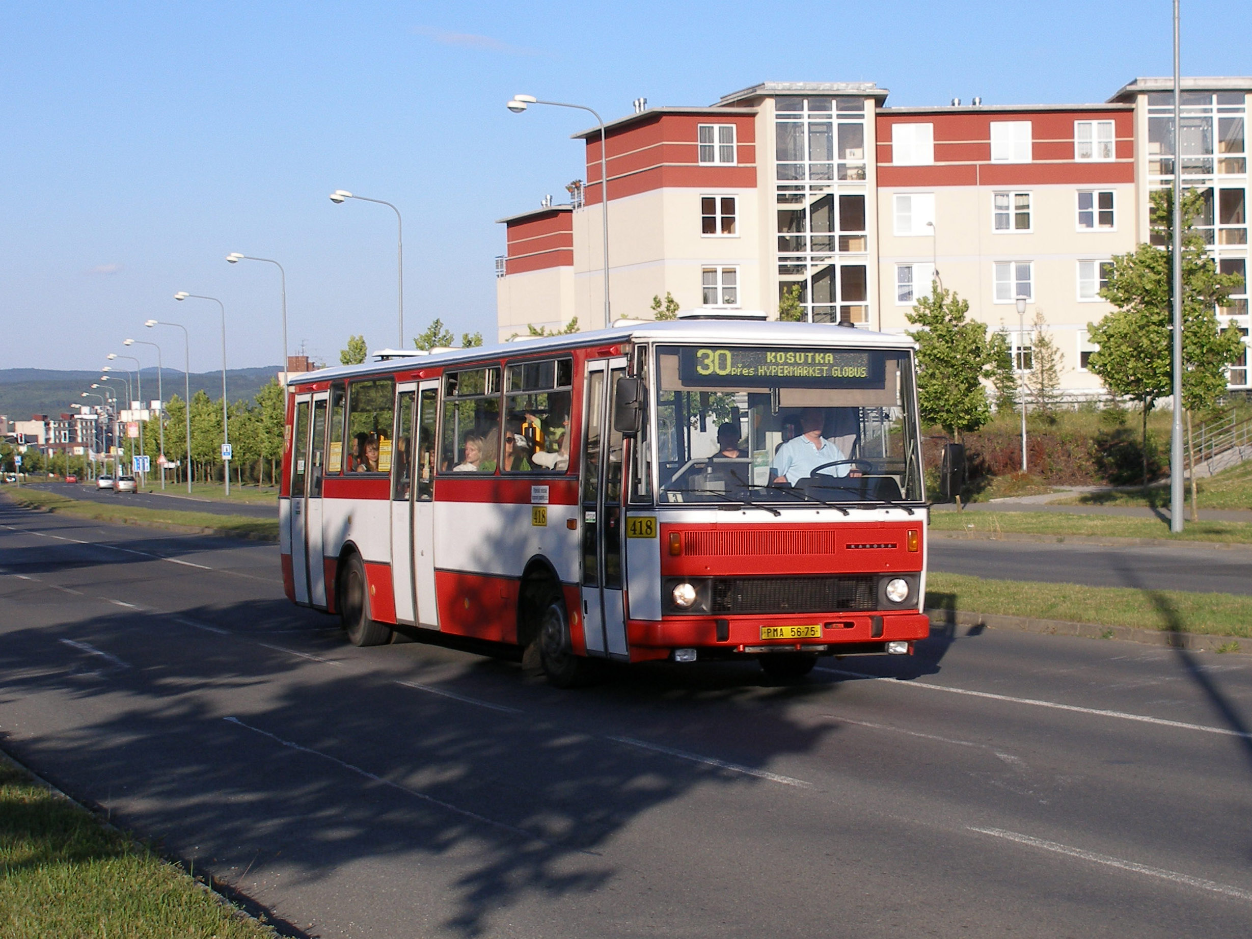 Karosa B 732 in Plzeň, Czech Republic